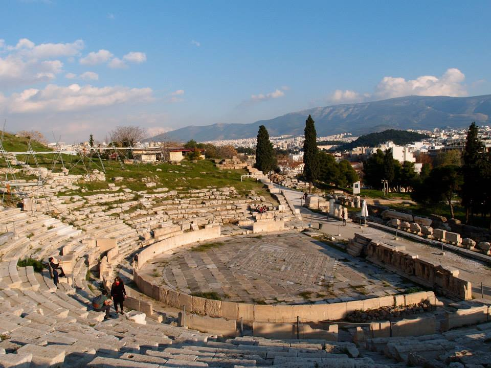 アテネにあるディオニュソス劇場